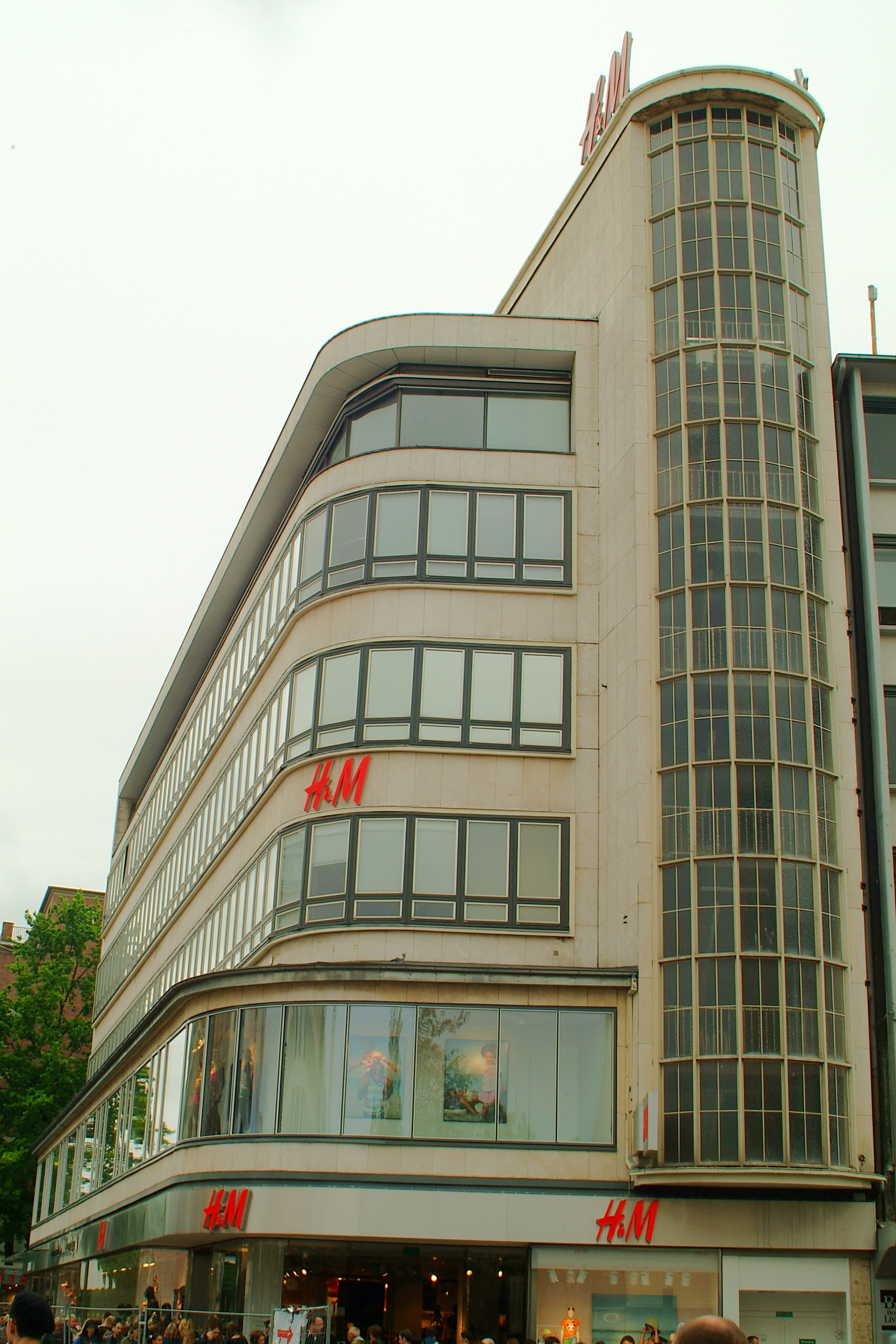 Das Kaufhaus Magis in Hannover, heute H&M, gesehen von der Seite des Treppenhausturmes.